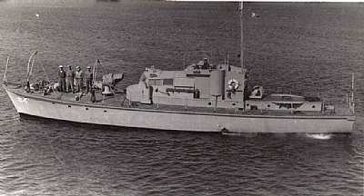 ספינת משמר אח"י תרצה